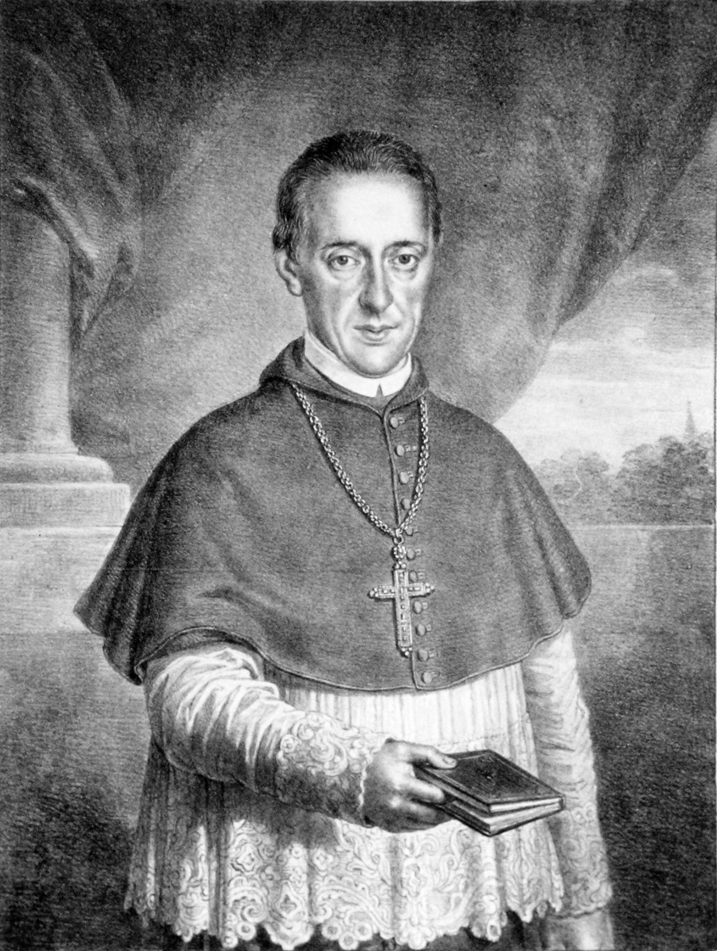 Leopold Maximilian von Firmian, Lithographie von Josef Lanzedelli d. Ä.